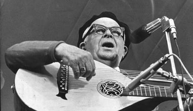 Evert Taube på Gröna Lund. Lutan är av märket Levin.